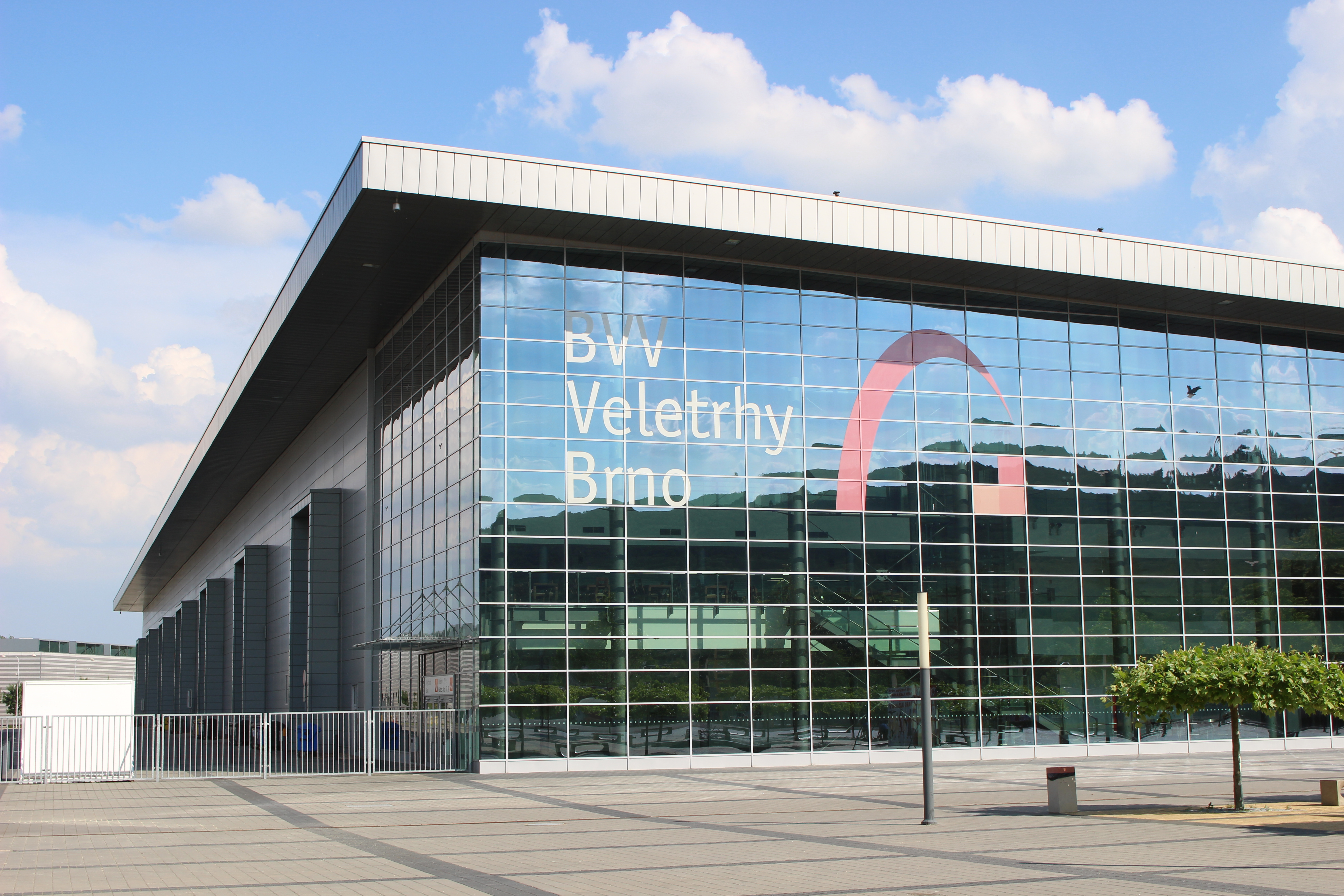 Pavilon P, Brněnské výstaviště